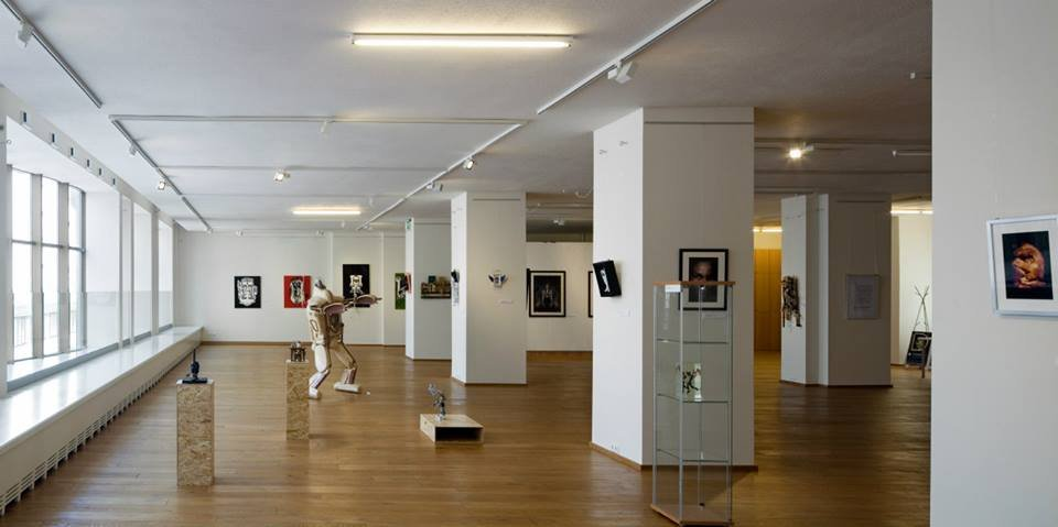 A Deák 17 Gyermek és Ifjúsági Művészeti Galéria kiállítóterének egy része